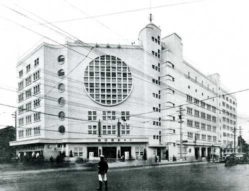 1932年竣工の大阪歌舞伎座。